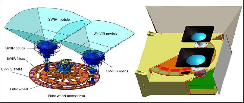 Ce schéma décrit le principe de fonctionnement de l'instrument 3MI. Les images proviennent de la phase 0 du projet. Crédit ESA